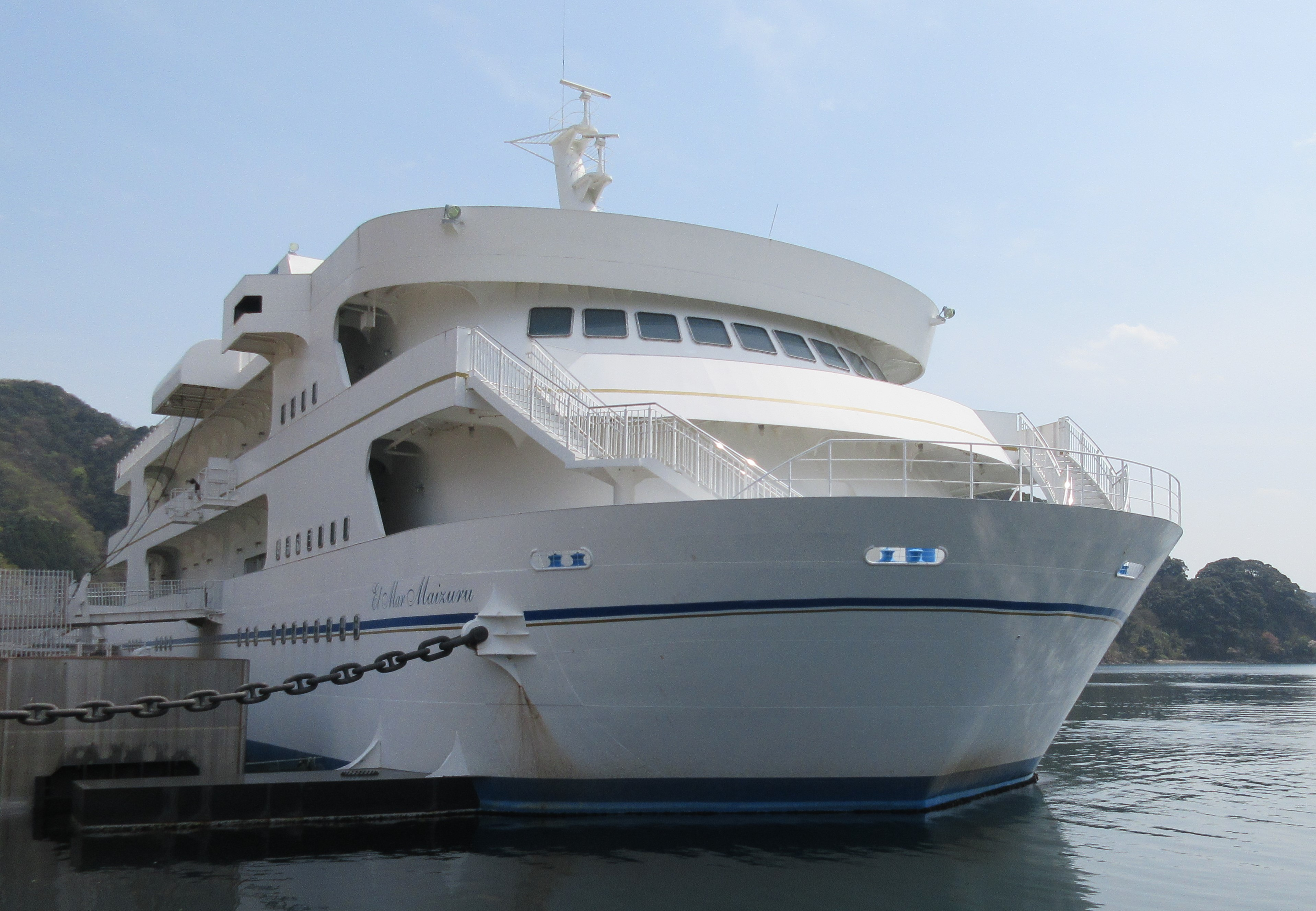 エルマール舞鶴